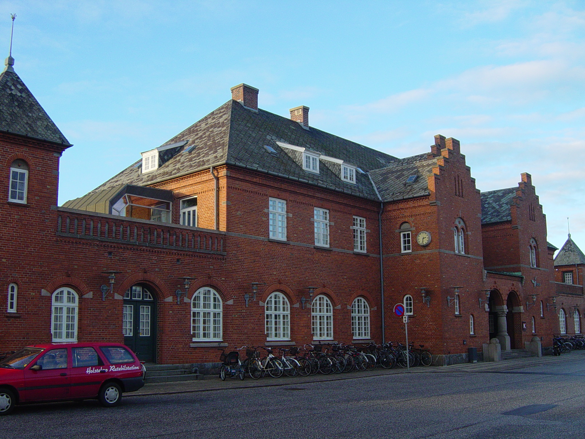 Holstebro Banegård